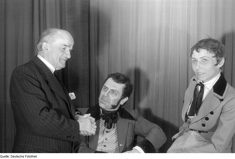 Original image description from the Deutsche Fotothek Gruppenbild mit Regisseur Ernst Legal